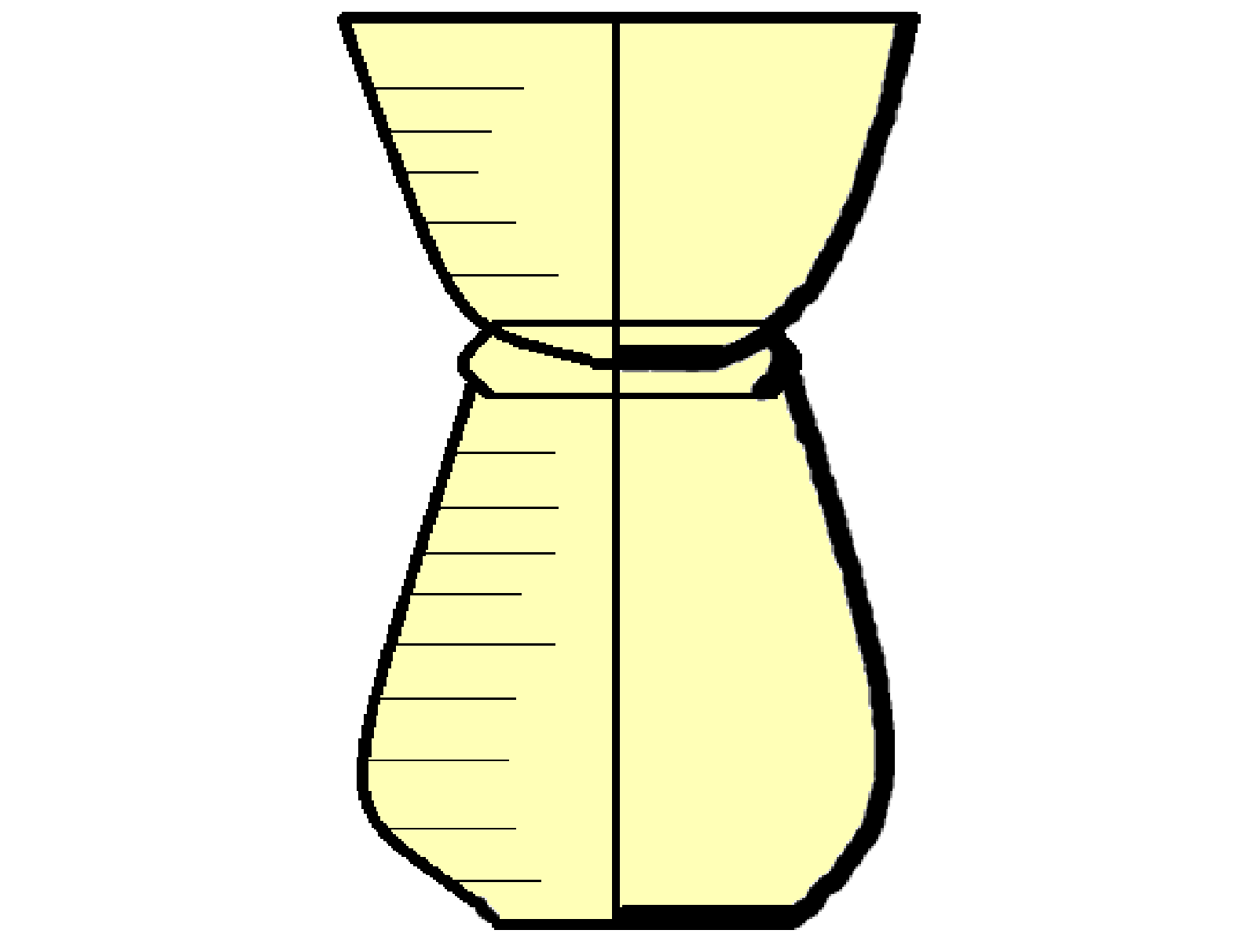 כלי חרס ששימשו להכנת הסוכר